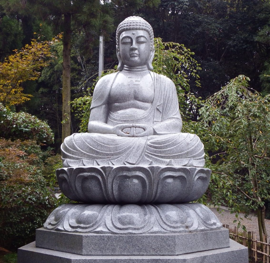 極楽寺に寄進されている本尊と同体の石仏